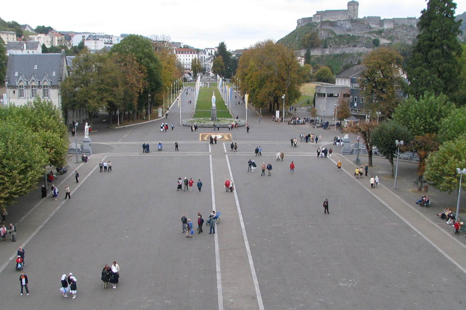 Esplanade devant la basilique Notre-Dame-du-Rosaire à Lourdes